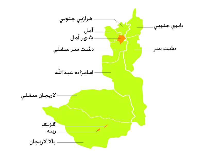 نقشه شهرستان آمل